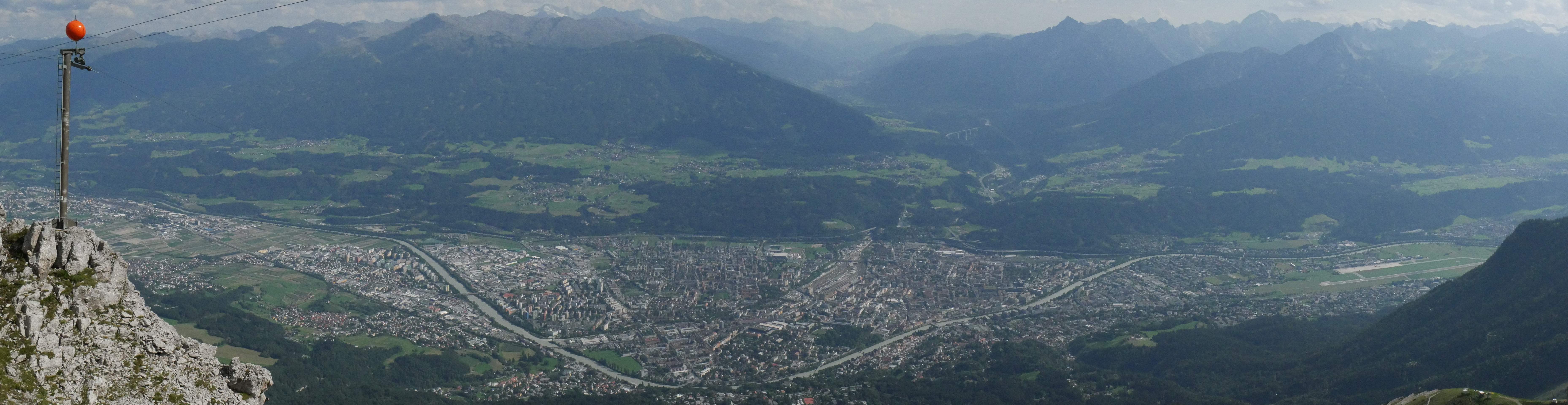 Panoramica sulla Valle dell'Inn